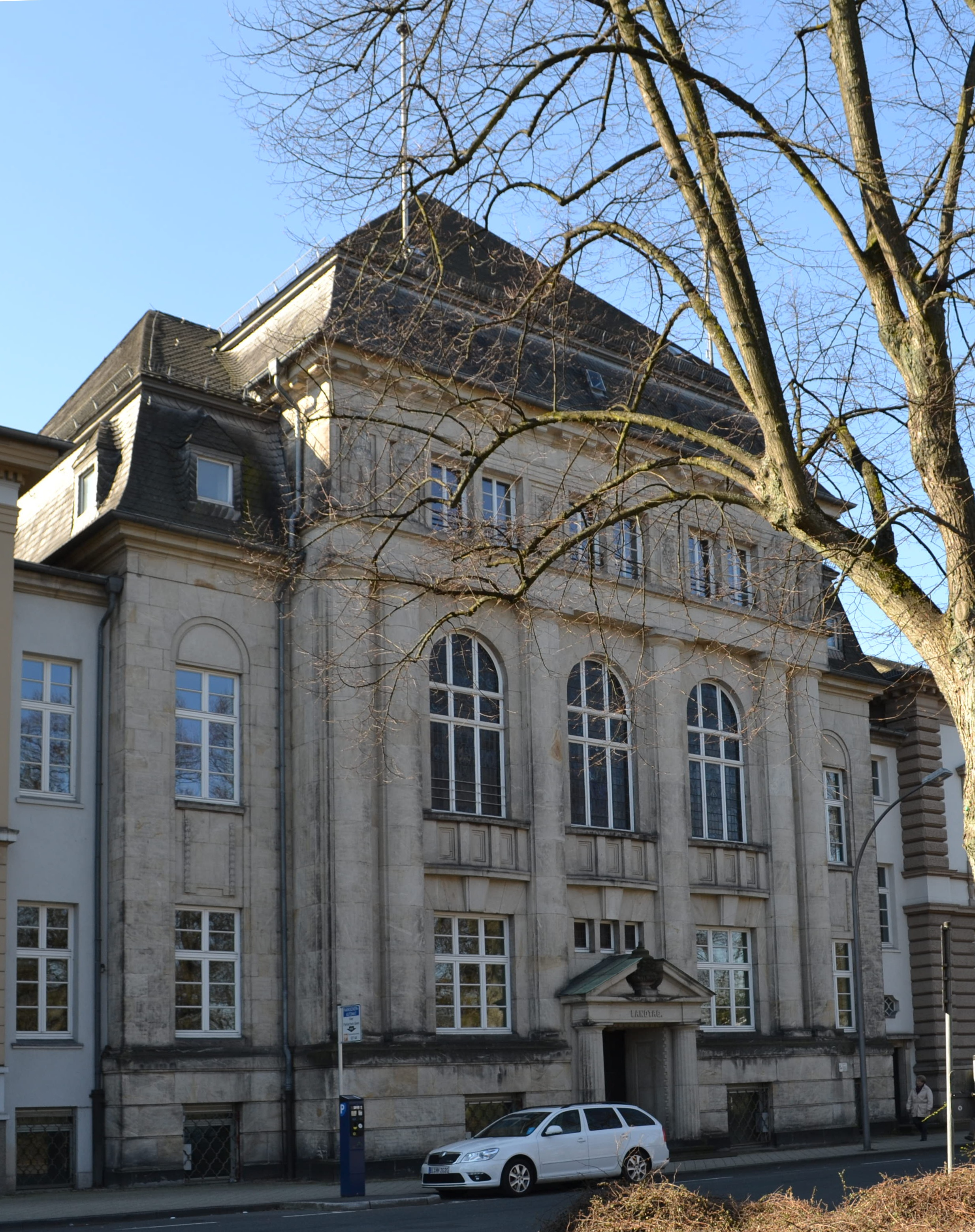 Baudenkmal Detmold Nr. 62 - Landgericht Detmold, ehemaliger Fürstlich Lippischer Landtag Heinrich-Drake-Straße